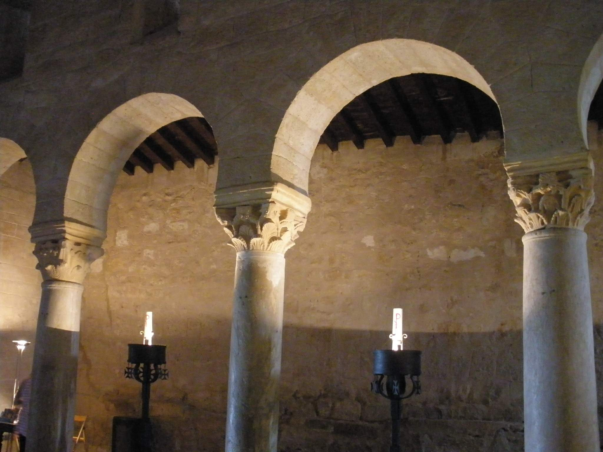 Basílica de San Juan de Baños (Baños de Cerrato, Palencia)